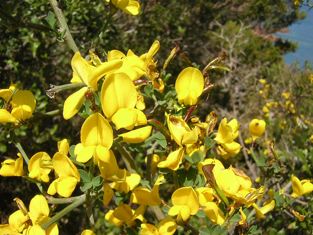 Genêt épineux Genista scorpius)